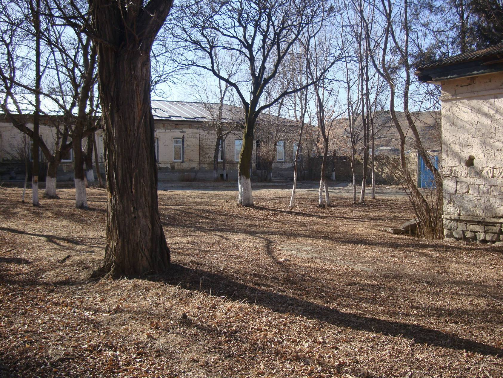 Лакский район, с. Хури